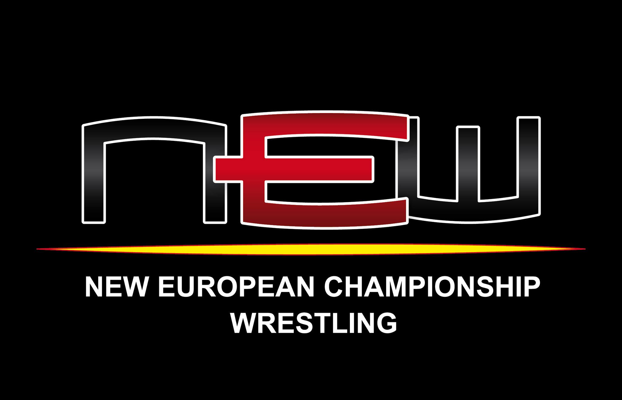 Logo der NEW